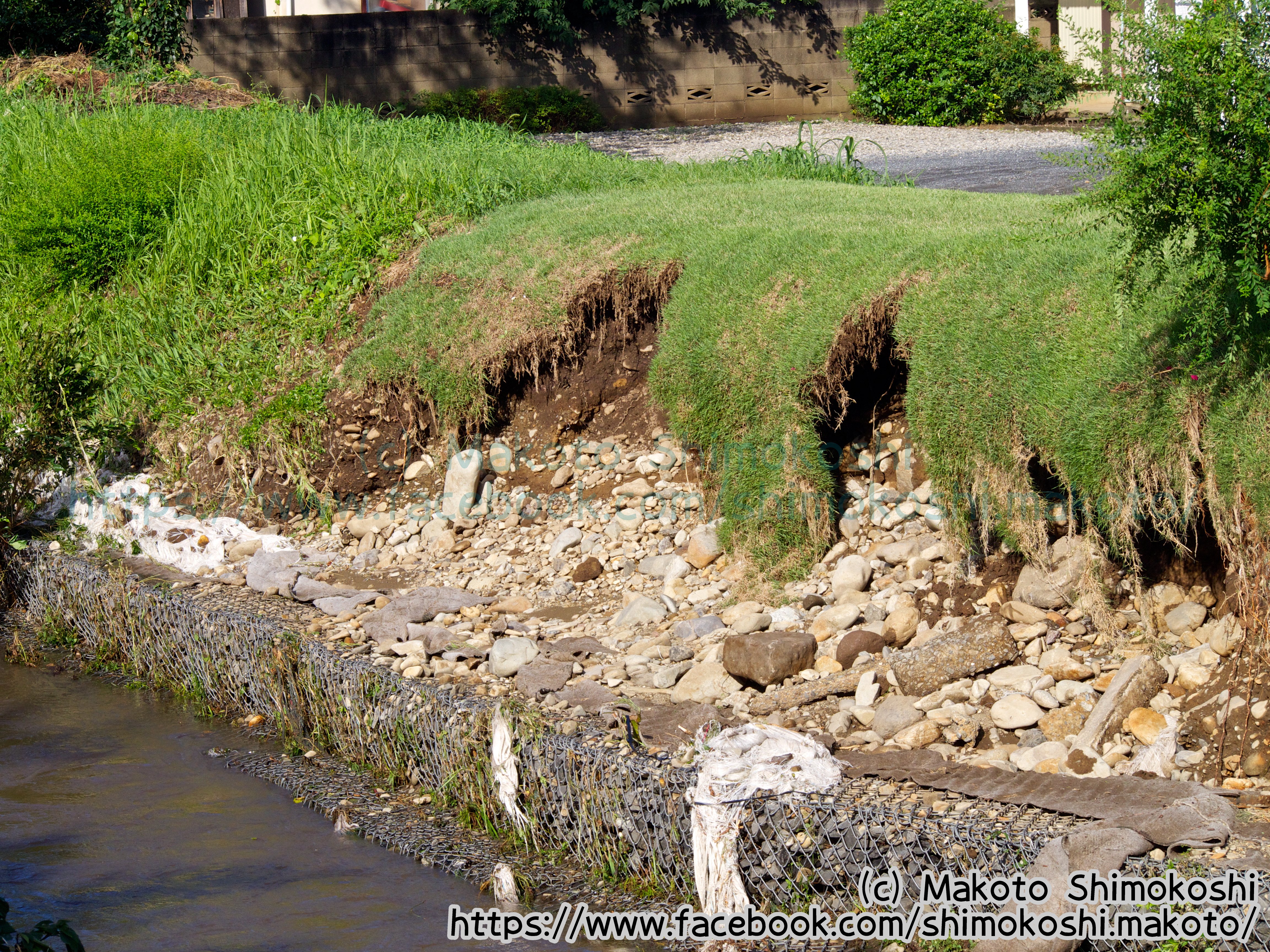 at Furou-river. Sayama, Saitama, Japan (2016-08-23)